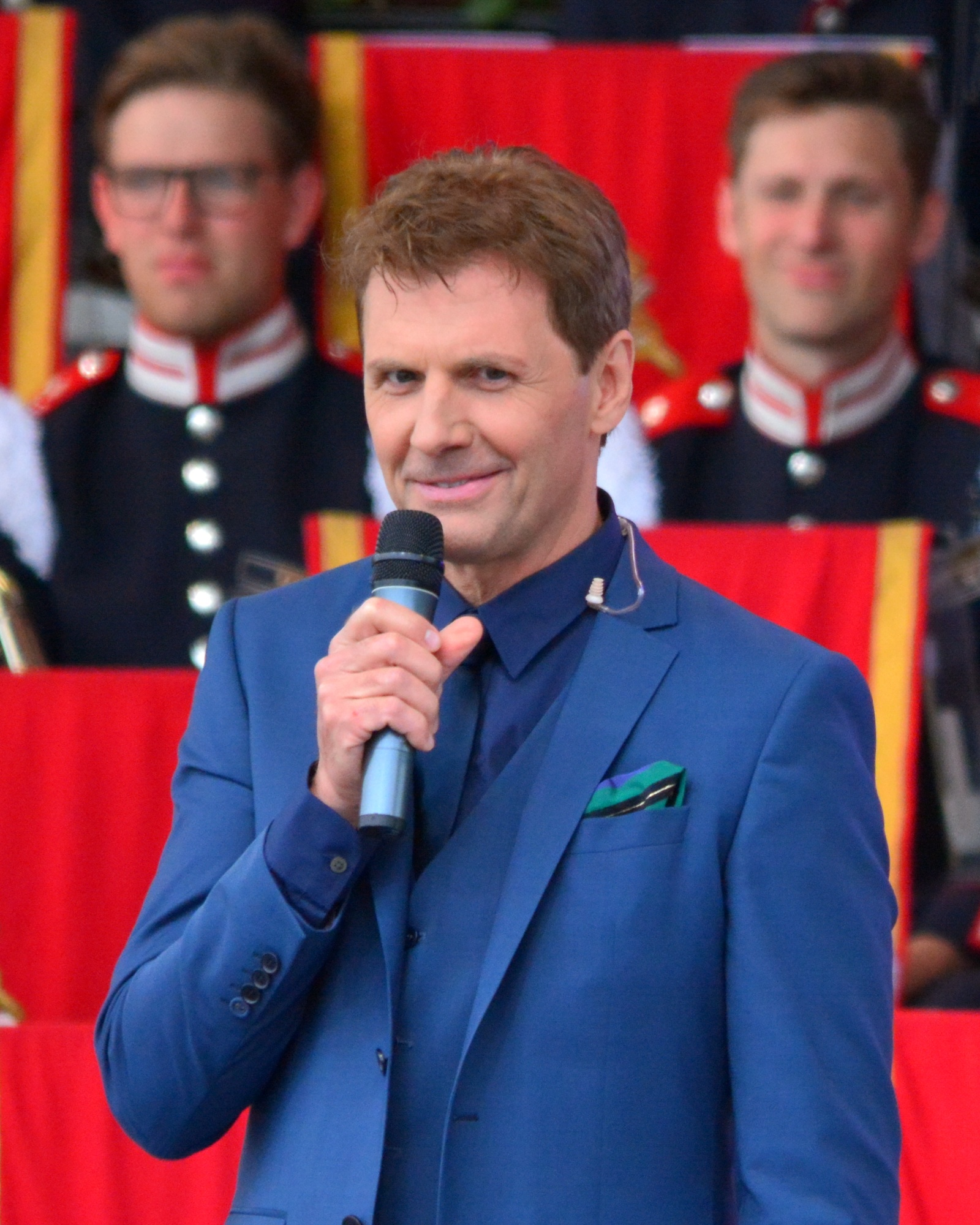 Micke Leijnegard